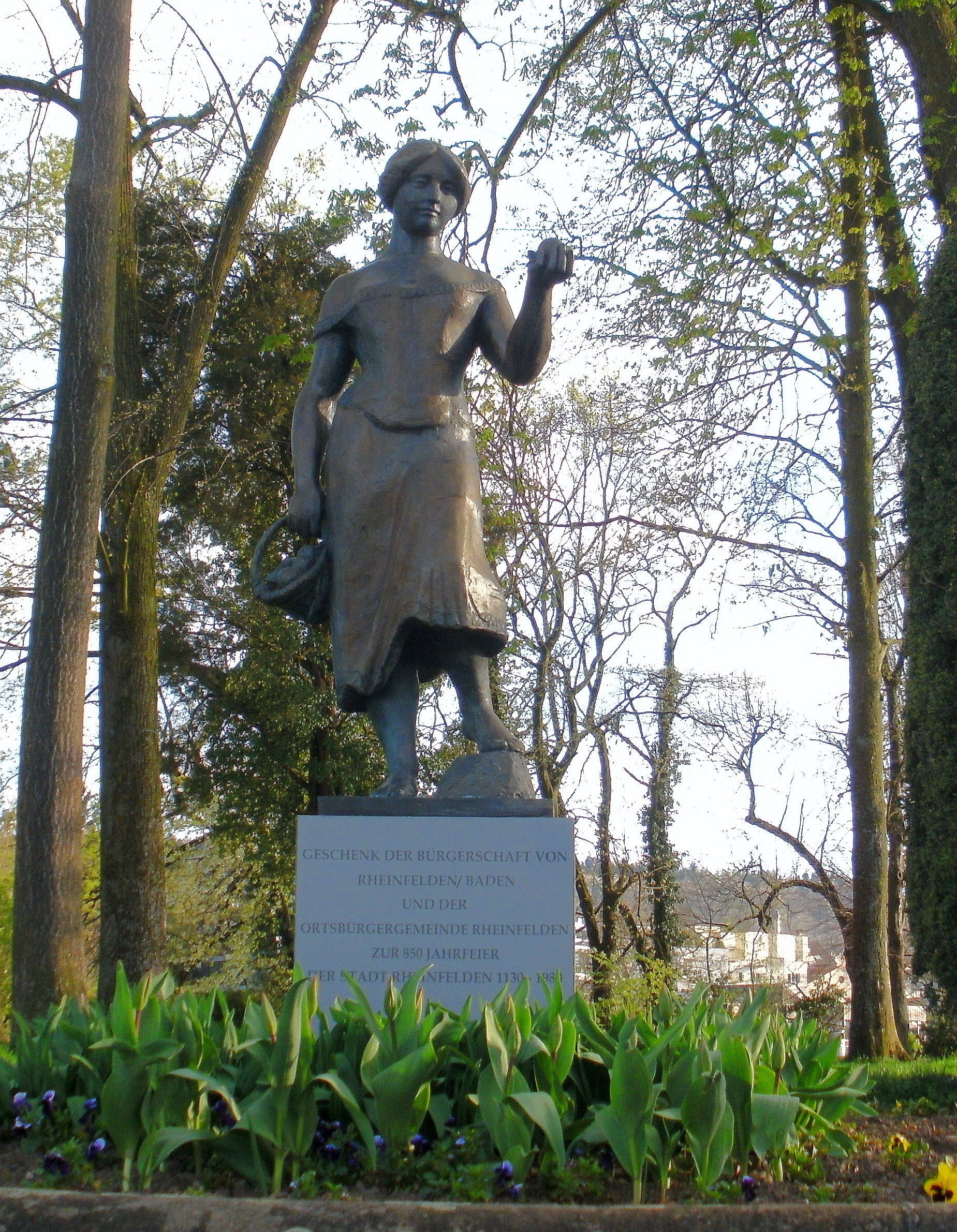 Bronzeskulptur „Judith“ (nach einer Figur aus dem Roman „Der grüne Heinrich“ von Gottfried Keller), geschaffen von Eduard Spörri, am Aufgang zum „Inseli“ bei der alten Rheinbrücke zwischen den Städten Rheinfelden (Baden) in Deutschland und Rheinfelden AG in der Schweiz. Ein Geschenk der Stadt Rheinfelden (Baden) an die Stadt Rheinfelden AG zur 850-Jahr-Feier 1980 (Quelle: Raimund Kagerer: Judith mit dem Apfelkorb: Die Gottfried-Keller-Figur als Bronze von Eduard Spörri. In: Stadt Rheinfelden (Schweiz) und Stadt Rheinfelden Baden [Hrsg.]: 2x Rheinfelden. Das Kultur- und Stadtmagazin beider Rheinfelden, 11. Ausgabe Juli/August 2010, S. 14).